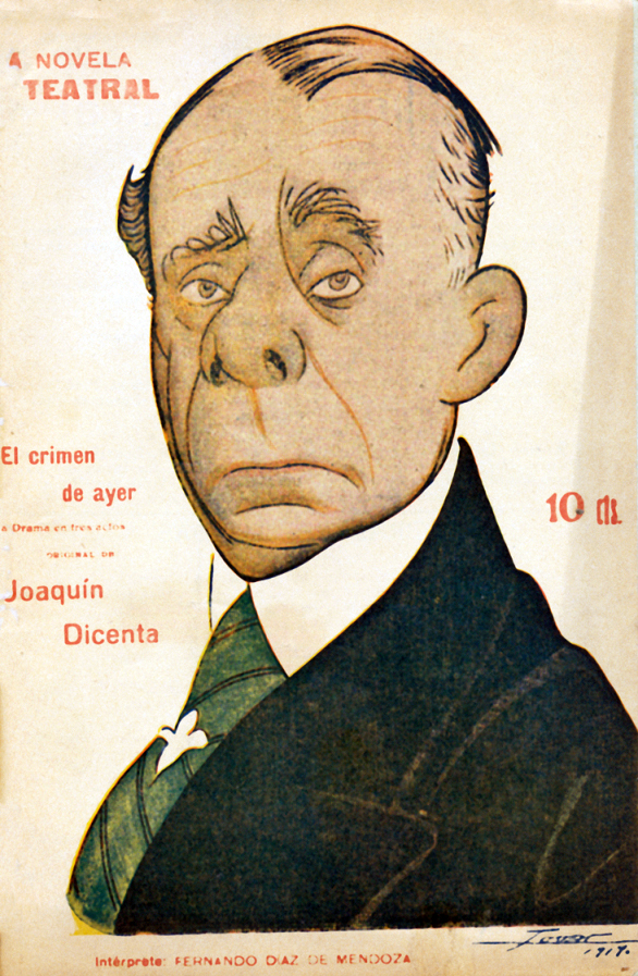 Caricatura de Fernando Díaz de Mendoza.